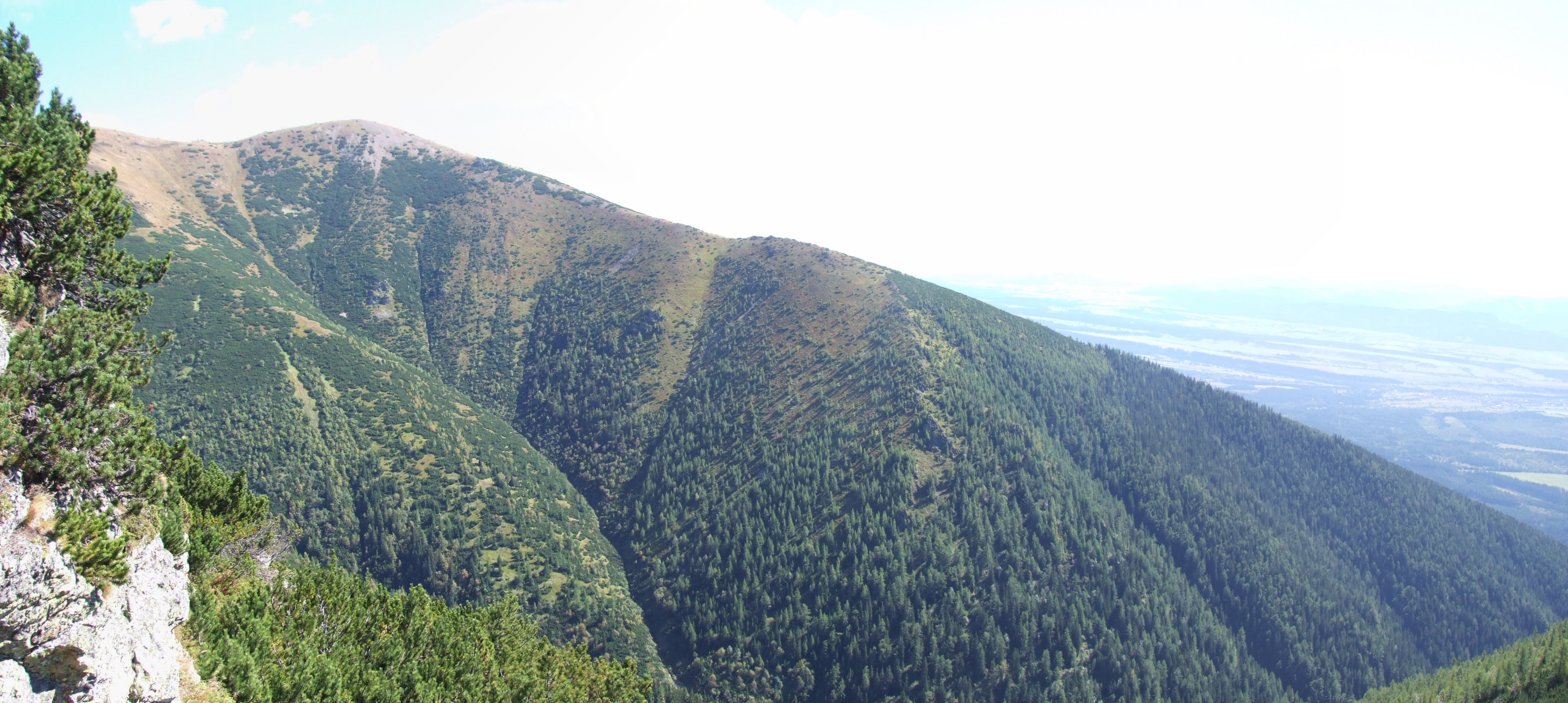 Mały Baraniecm jego grań Bryszne i Dolina Tarnowiecka. Widok z północno-zachodniej grani Barańca